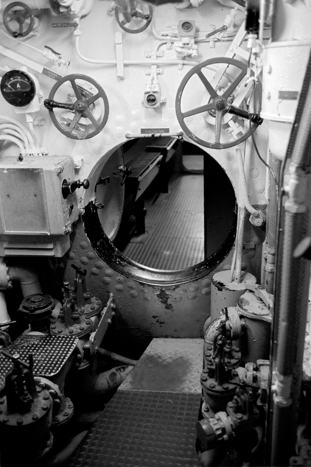 VII C U-Boot Zentrale